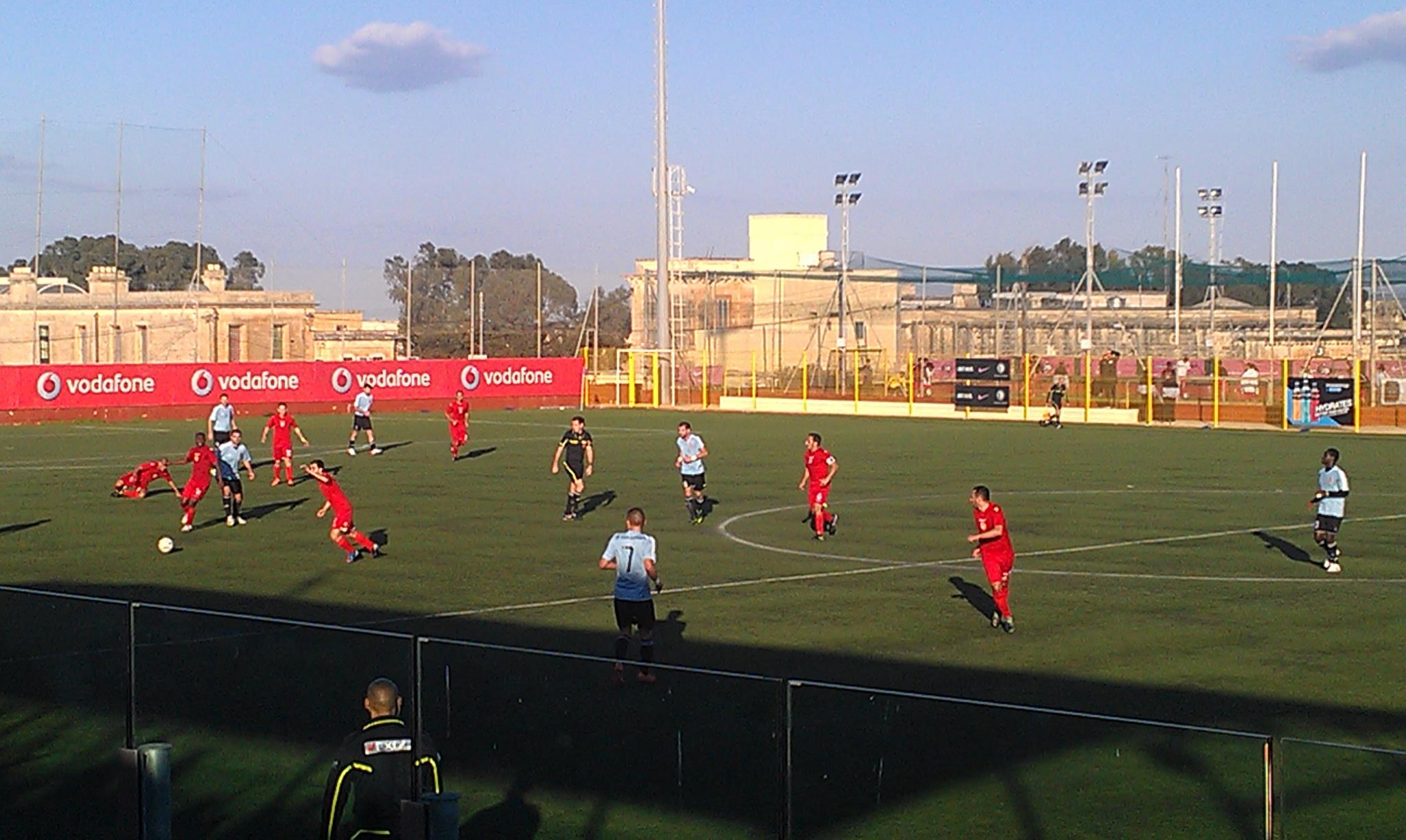 Pogled na nogometni Stadion Ta Qali v mestu Naxxar na severu Malte. Igralci Naxxar Lions FC (v rdečih dresih)